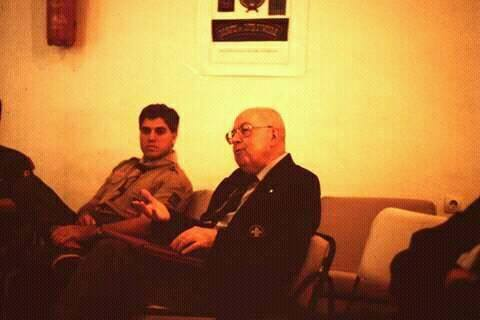 Enrique Genovés durante el primer encuentro del Club Tejones (coleccionistas scouts) celebrado en Madrid, 1990